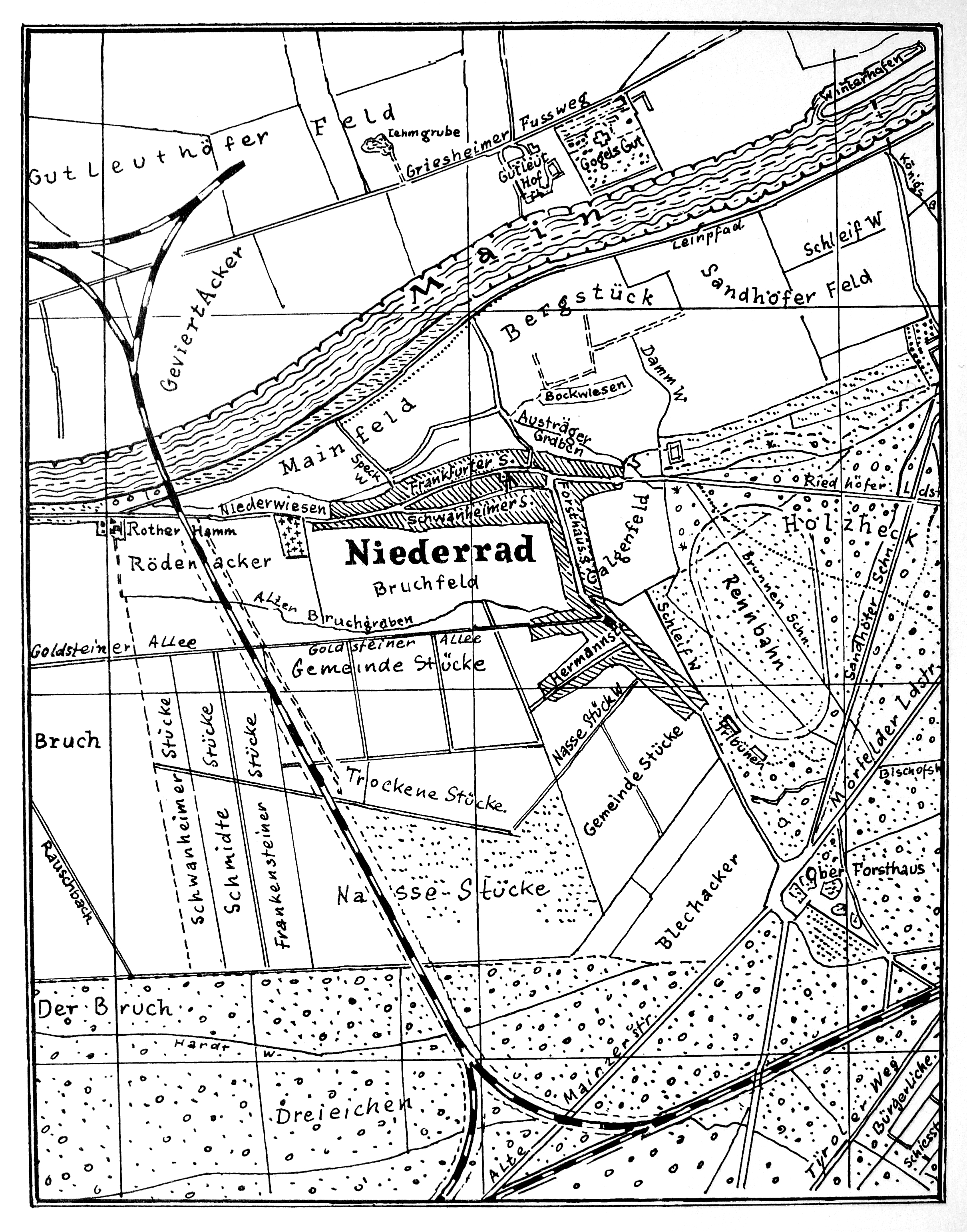 Frankfurt am Main, Stadtteil Niederrad: Lageplan des ehemaligen Dorfes Niederrad im Südwesten der Stadt; Karte aus dem Jahr 1879 mit Flurnamen. Zu den auf der Karte eingezeichneten Details siehe die Anmerkungen (“Notes”) auf der Abbildung.